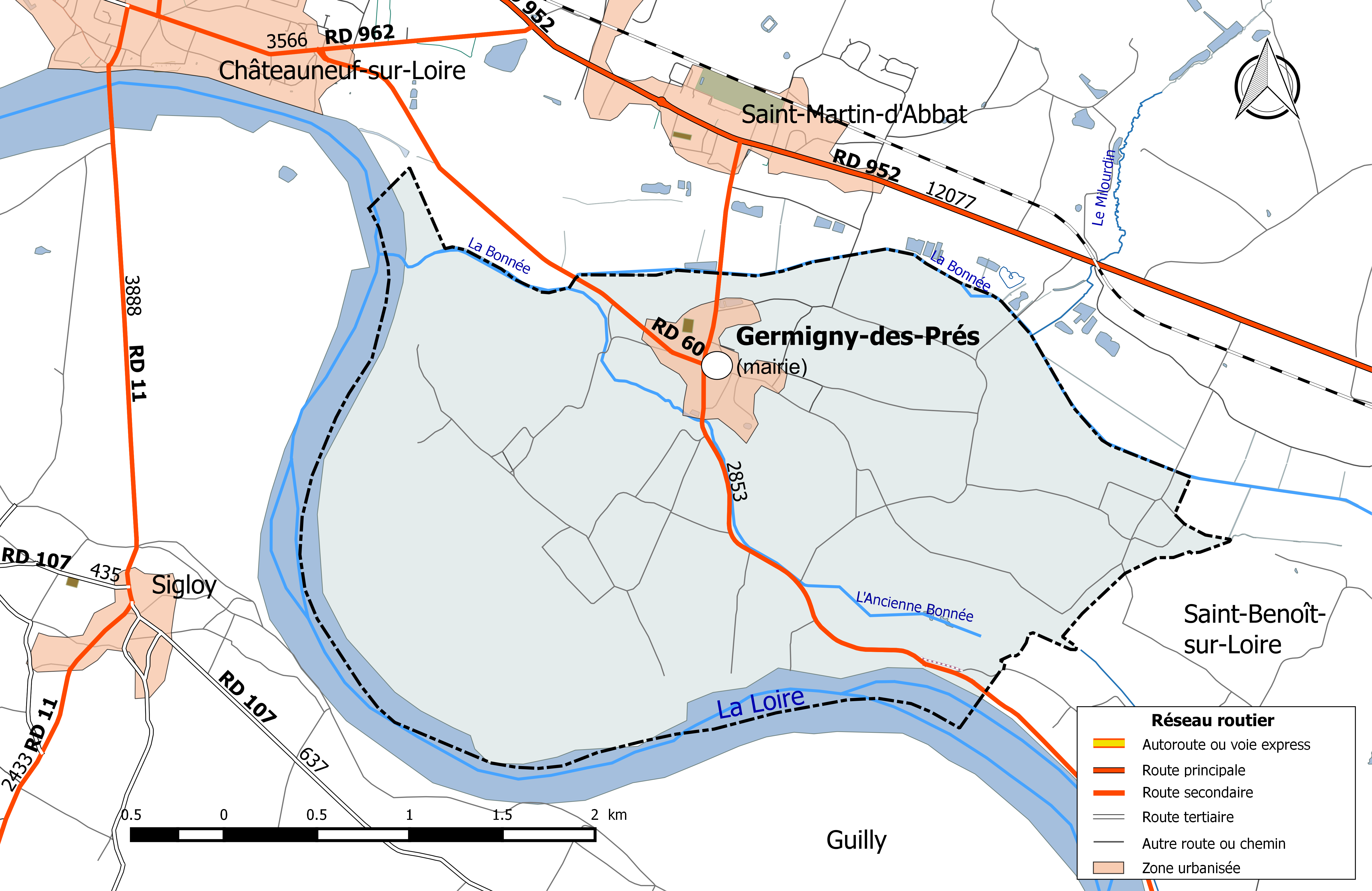 Carte du réseau routier de la commune de Germigny-des-Prés.